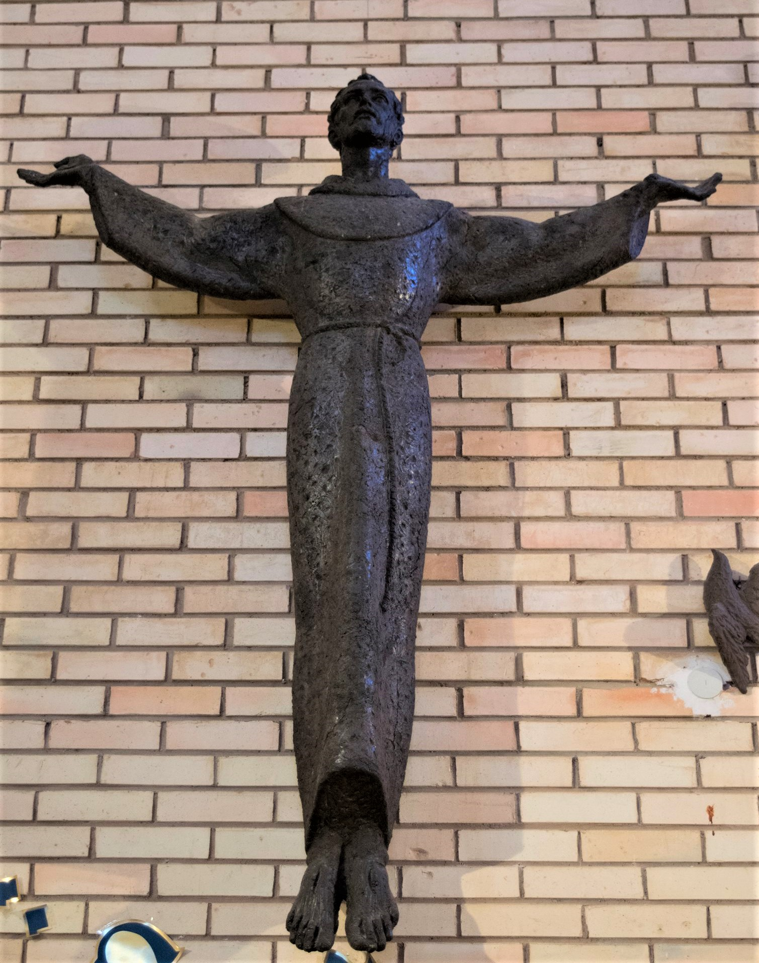 Imagen de "San Francisco de Asís" del escultor José Zamorano. Iglesia de Nava de Campana.